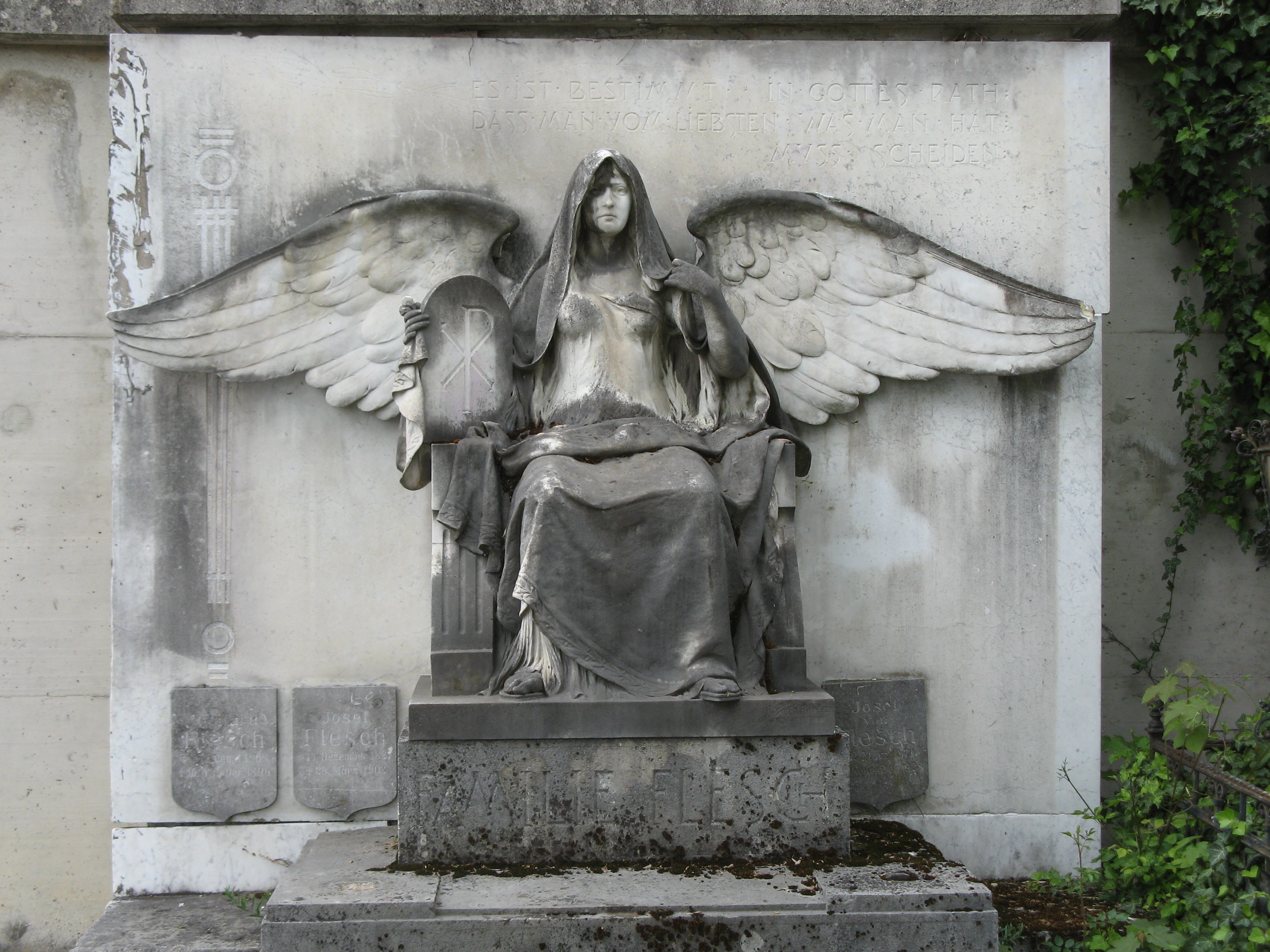 Grabmal (1898) von A. Kaan, Ober Sankt Veiter Friedhof, Wien-Hietzing